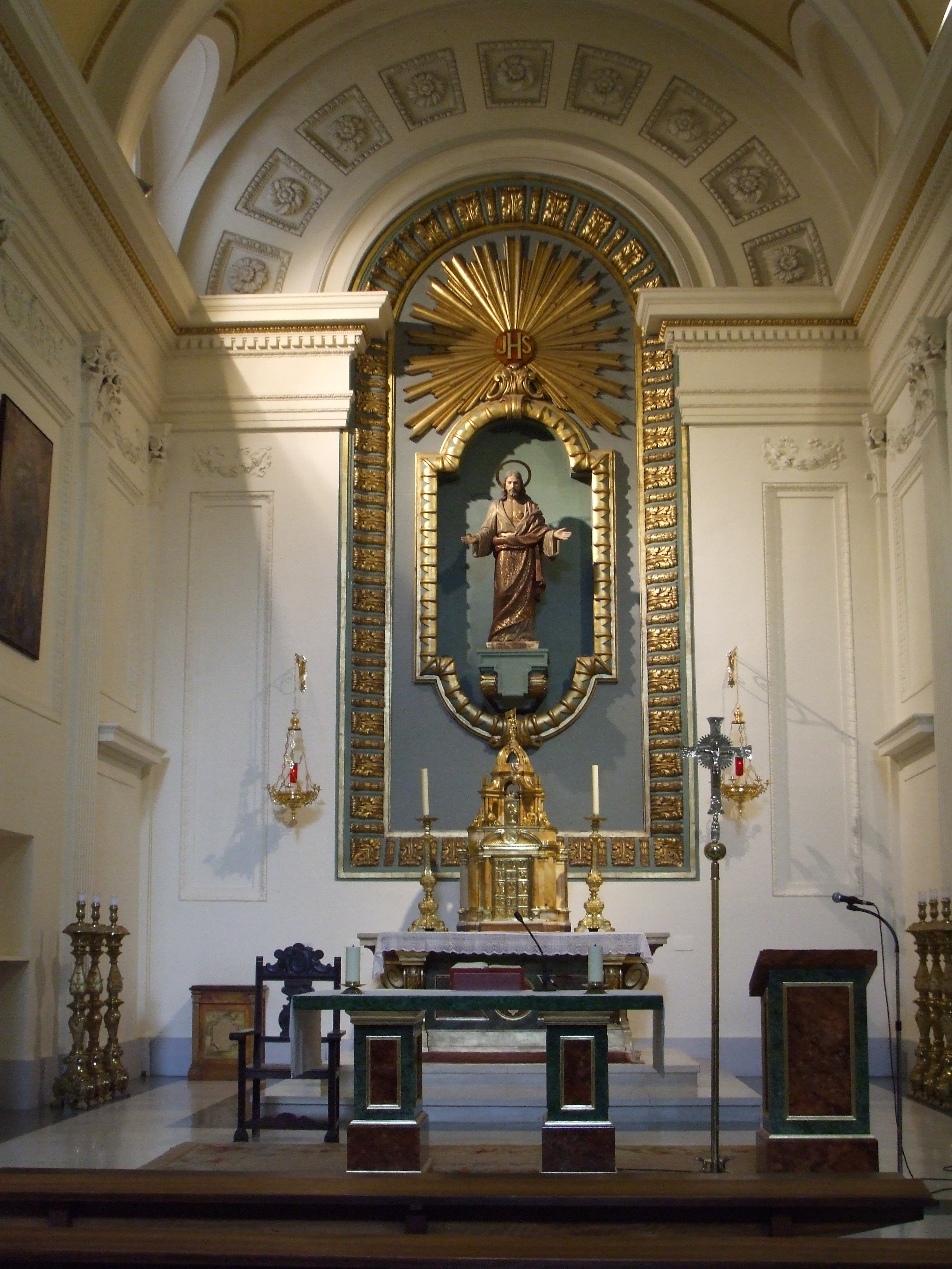 Iglesia de San Sebastián (Madrid), Capilla del Sagrado Corazón